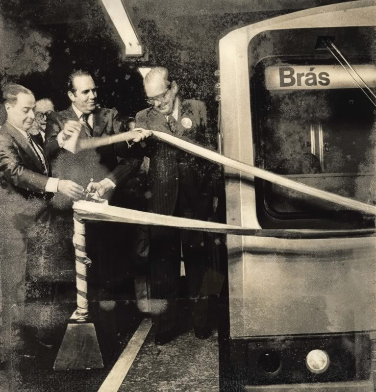 O prefeito de São Paulo Olavo Setúbal (à direita) e o governador Paulo Egydio Martins (á esquerda) cortam a fita inaugurar do trecho Sé-Brás da Linha Leste–Oeste do Metrô de São Paulo.